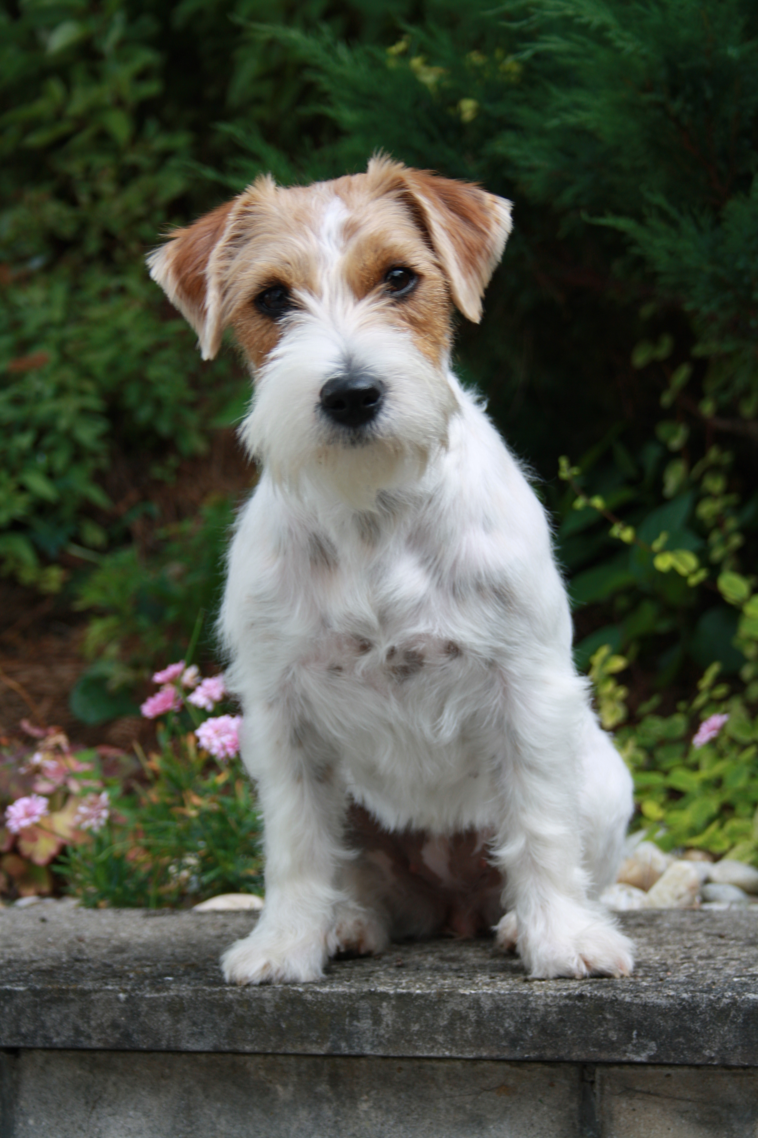 Rough coat Jack Russell terrier